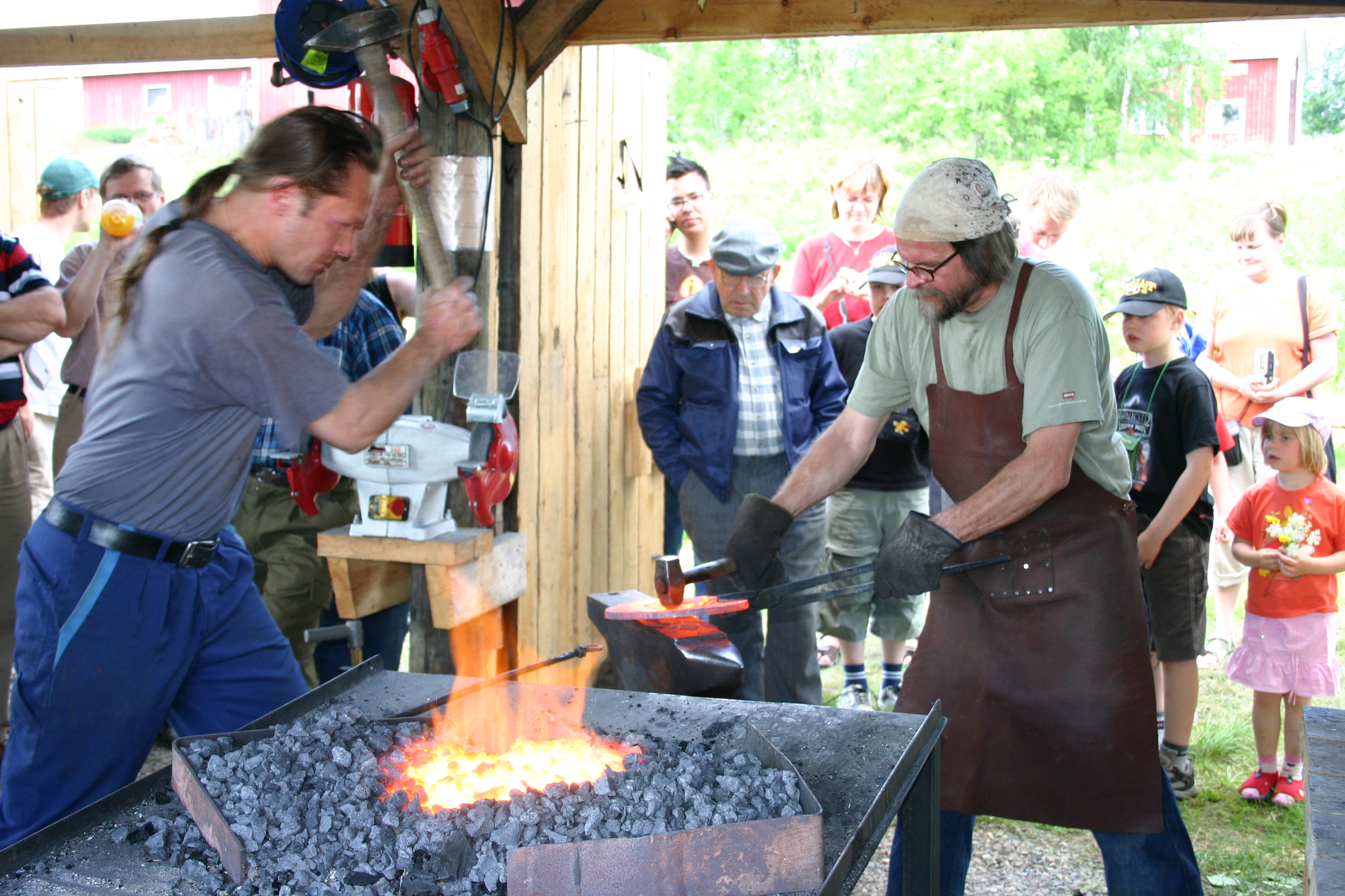 Taontanäytökset ovat osa Sirniön seppäpäivien jokavuotista ohjelmaa